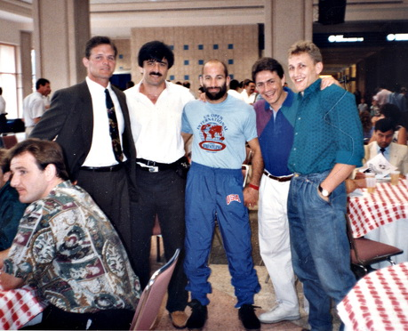 RU: Члены национальных сборных по вольной борьбе: СССР, США, Чехословакии. Слева на право Д.Шер (США),В.Казибеков, (СССР). Дэйв Шульц (США). Лерой Смит (США), Ёзеф Логиня (Чехословакия). EN: The members of the national teams in freestyle wrestling: USSR, USA, Czechoslovakia. From left to right D.Sher (USA), V.Kazibekov, (USSR). Dave Schultz (USA). Leroy Smith (USA), Jozef Login (Czechoslovakia).